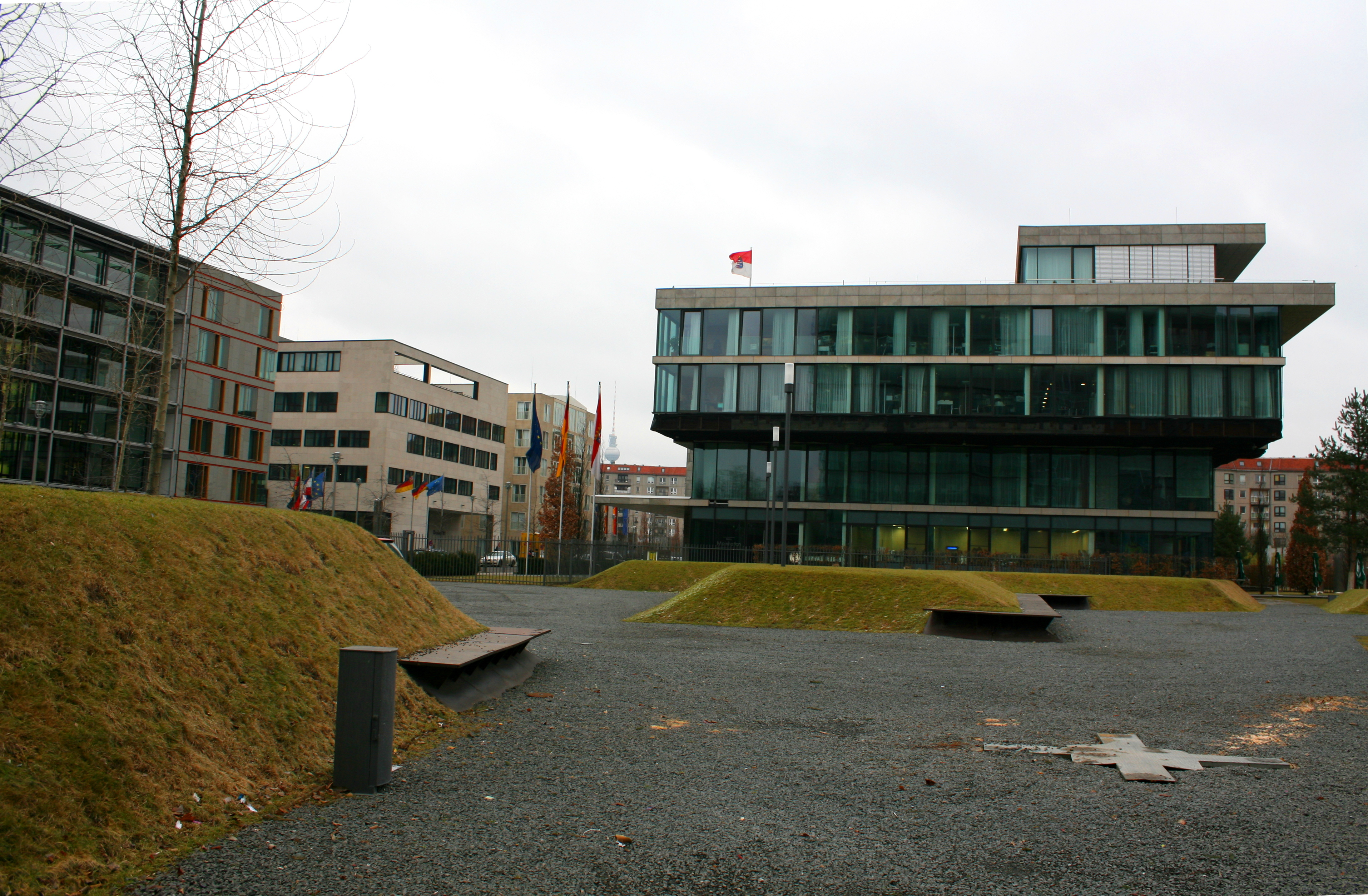 Ministergärten in Berlin, im Vordergrund die Vertretung des Landes Hessen beim Bund